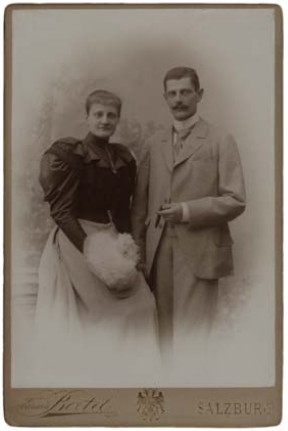 Eugenie „Jenny“ Mell, geb. von Freyschlag (1870–1967) und Anton Mell (1865–1940), um 1895 Albuminpapier, Cabinetformat, 16,5 x 11 cm; Aufdruck des Fotografen auf dem Untersatzkarton